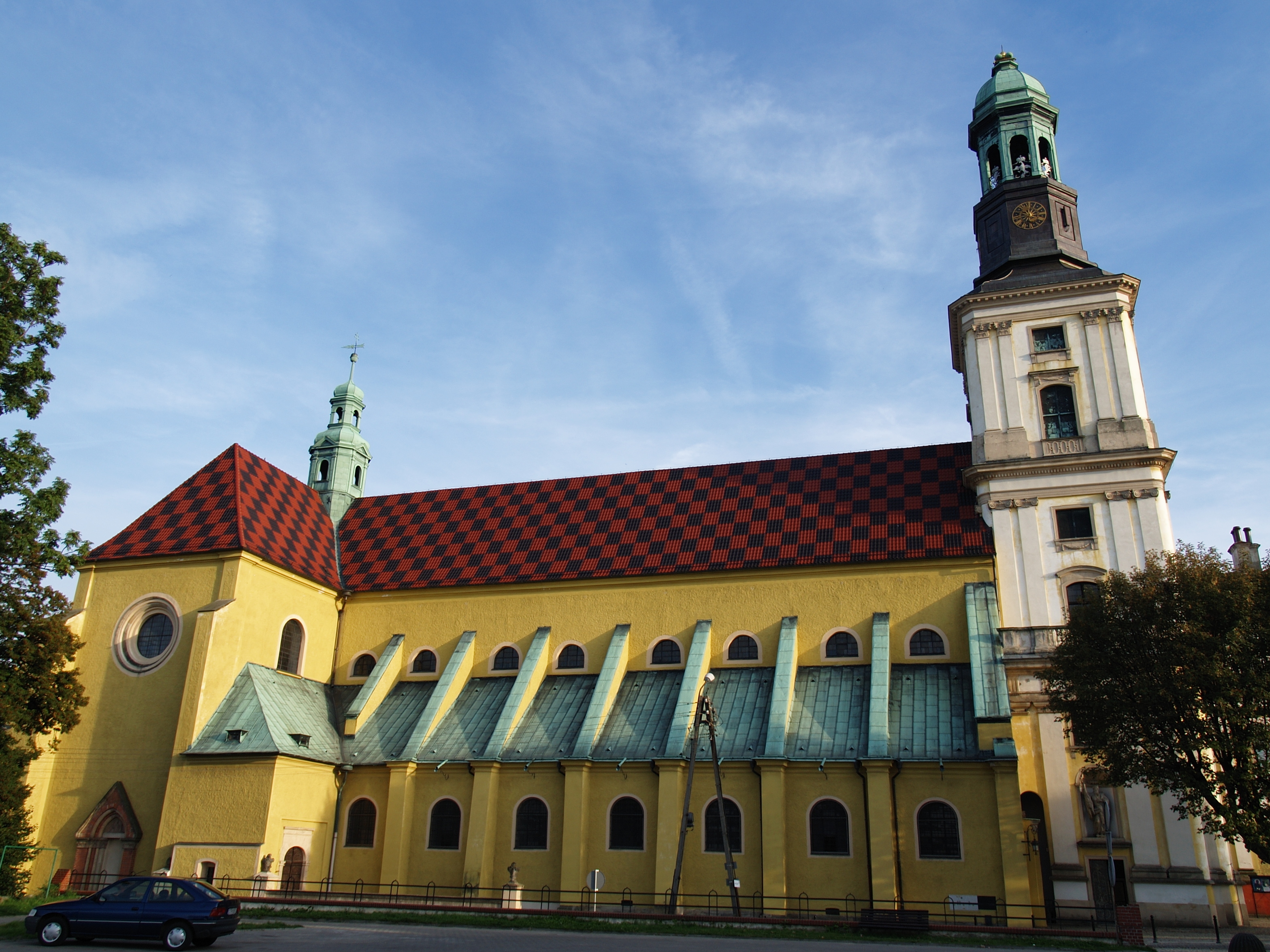 Kościół par. św. Bartłomieja i Jadwigi, d. klasztorny Trzebnica, ul. Jana Pawła II, Trzebnica